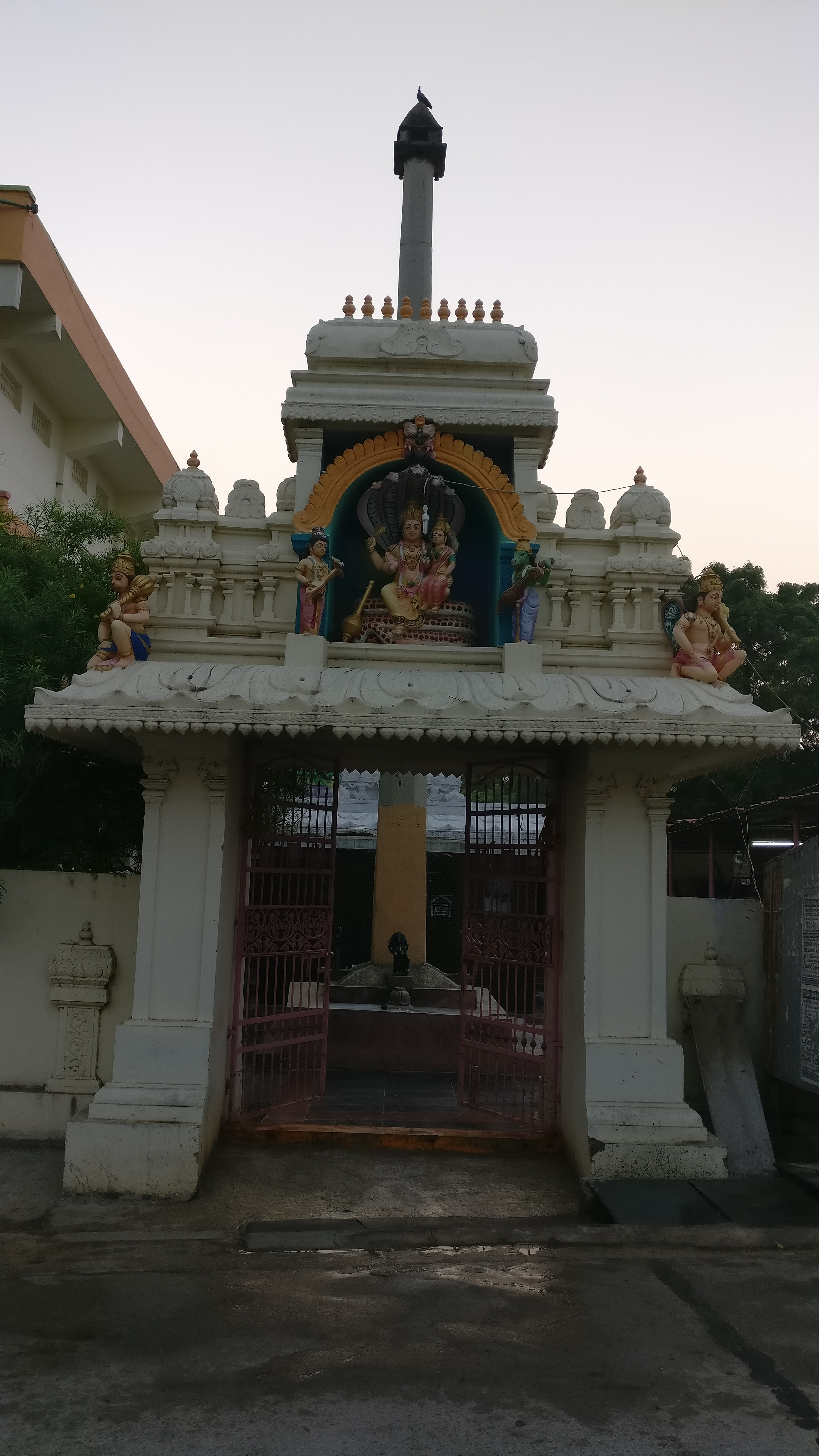 ఈ గ్రామంలోని శ్రీ చెన్నకేశవస్వామి వారి దేవాలయం అతి పురాతనమైనది. 2007 లో దేవాలయ పునఃరుద్ధరణ సమయంలో బయటపడిన పురాతన విగ్రహాల ద్వారా ఇచ్చట దాదాపు 15వ శతాబ్దము నుండి దేవాలయం కలదని తెలుస్తుంది. ప్రస్తుతం త్రిభంగి రూపంలో ఉన్న స్వామివారి విగ్రహం దాదాపు 300 సంవత్సరాల క్రితం ప్రతిష్ఠంపబడి గ్రామ ప్రజలచేత పూజలందుకుంటూ ఉంది. ఈ దేవాలయం గోడలమీద పురాతన కాలంలో చెక్కిన శిల్పసంపద మరియు శాసనాలు దాగి ఉన్నాయి. ఈ గుడిలో ఉపదేవాలయలు ఉన్నాయి.